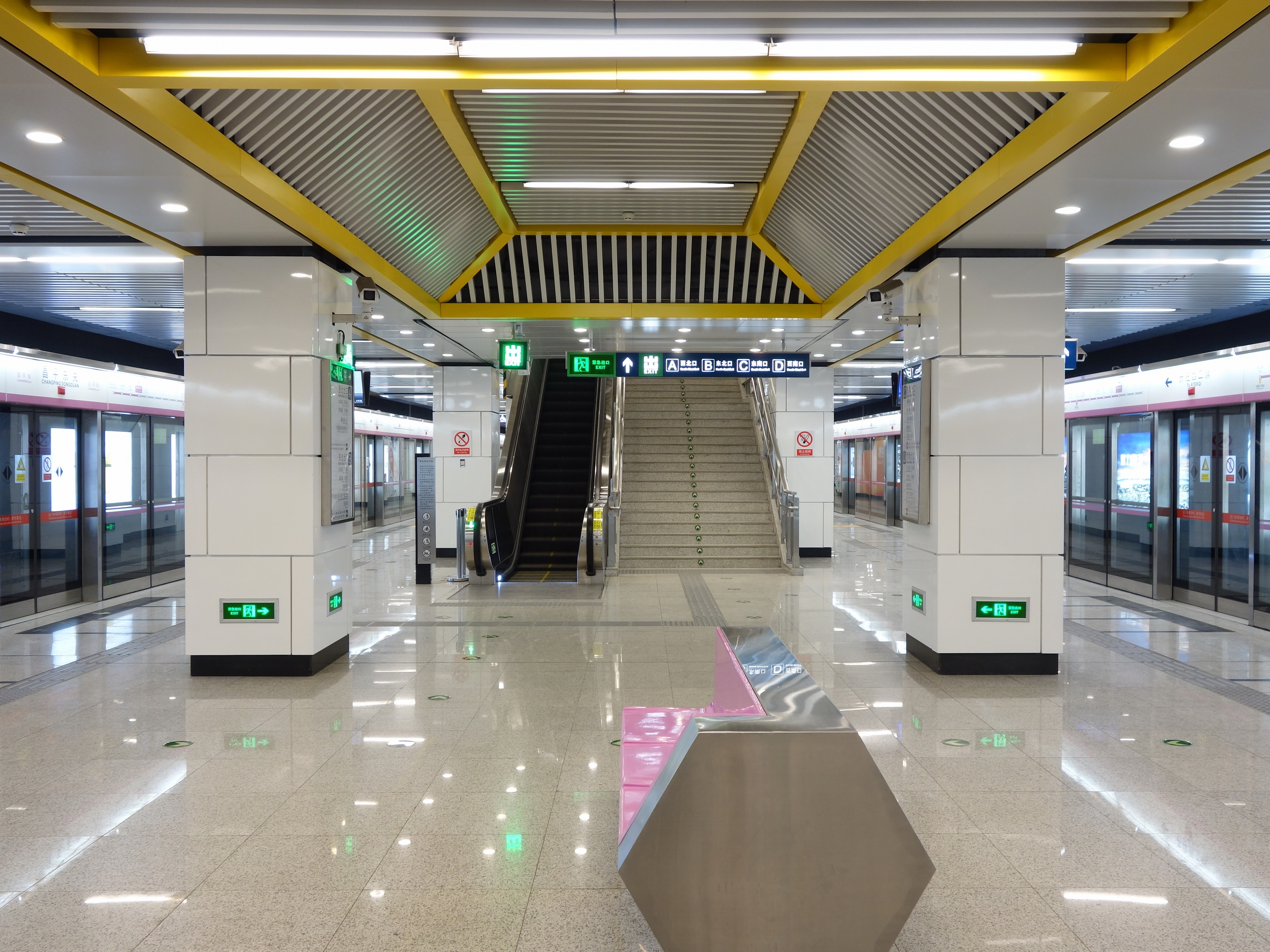 北京地铁昌平线昌平东关站岛式站台